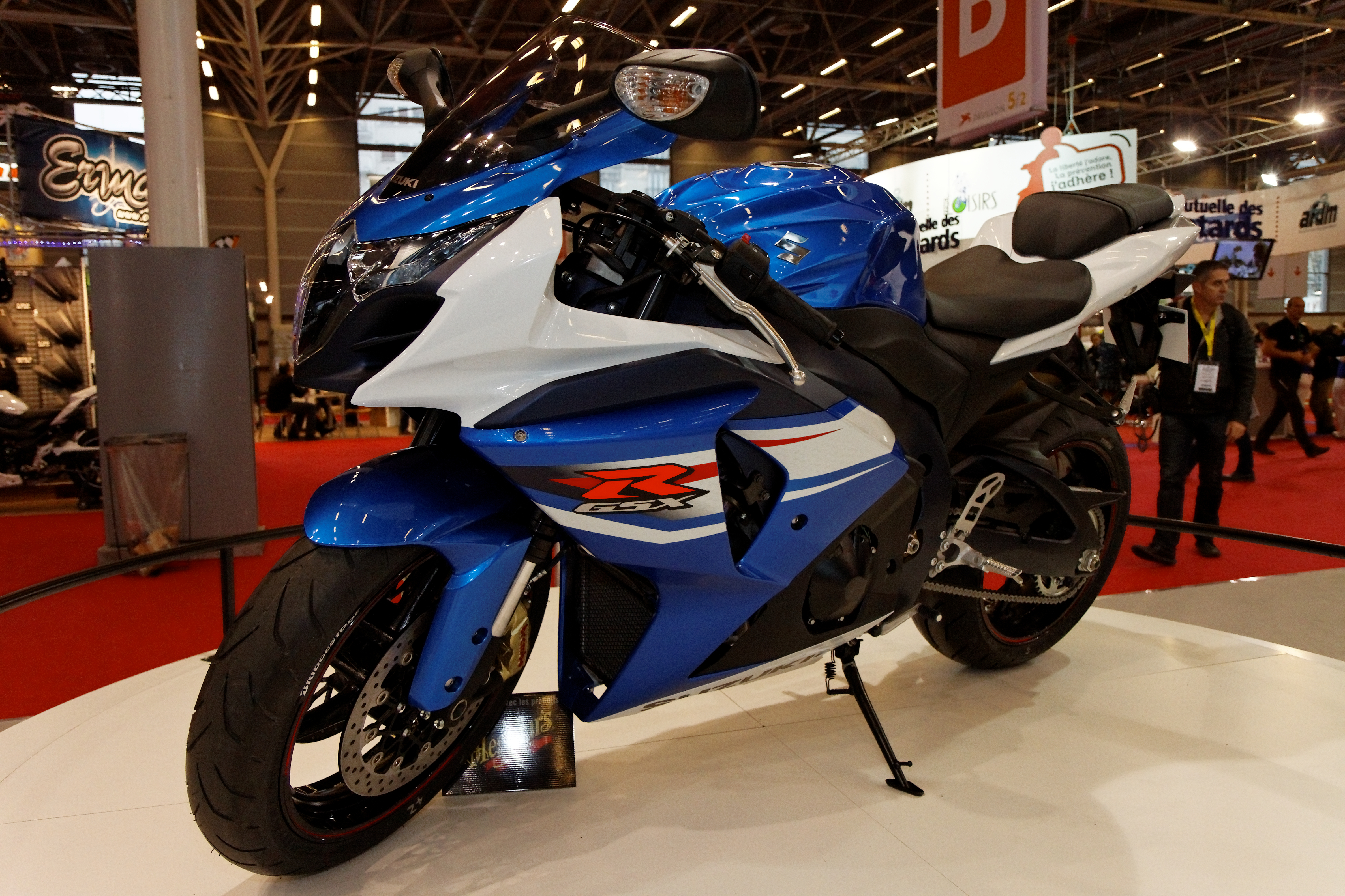 Suzuki - GSX-R 1000